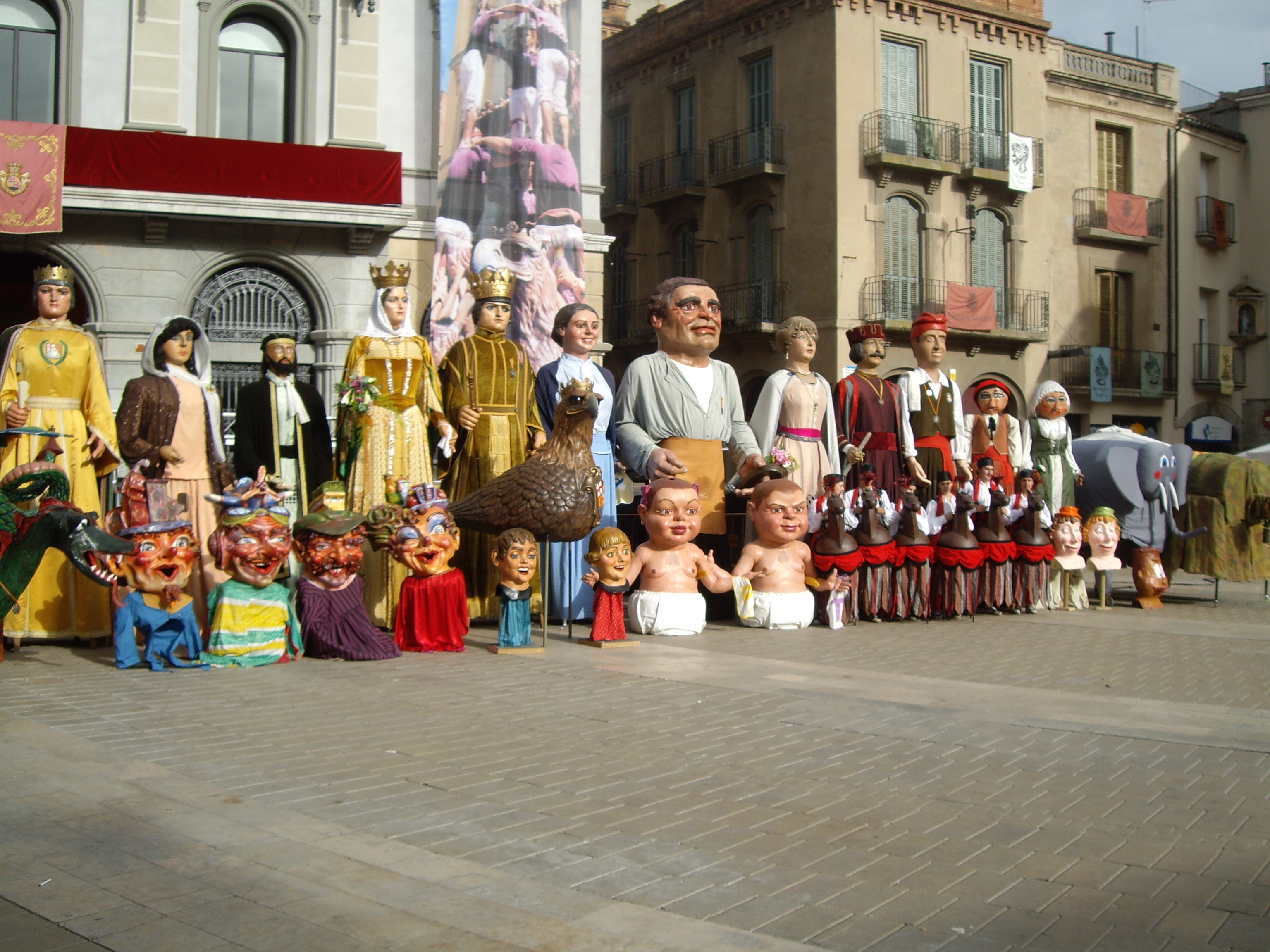 Exhibició de gegants i cap-grossosa la Festa Major d'Igualada